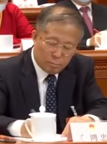 中央政治局委员李鸿忠在十三届全国人大三次会议上，2020年5月22日。